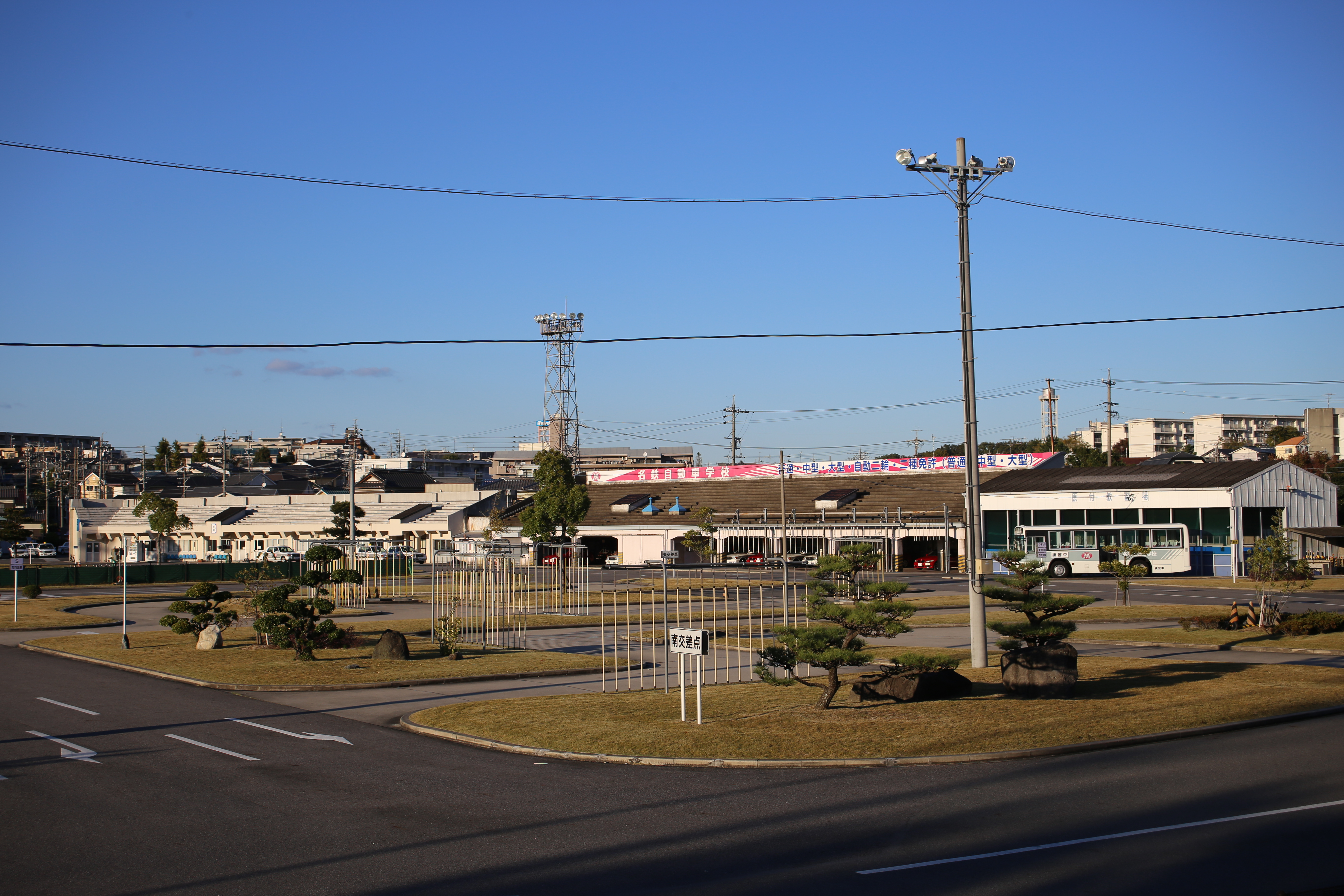 名古屋市緑区鳴海町文木の名鉄自動車学校